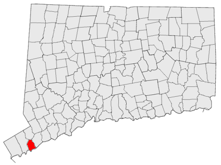 US-CT-Darien